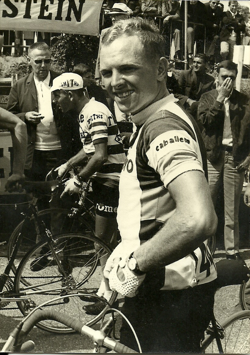 Foto is genomen tijdens de Wielerronde Stein (L) omstreeks 1973